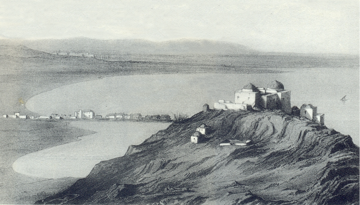 Vue sur le lac de Tunis à partir de la zaouïa de Sidi Belhassen Chedly